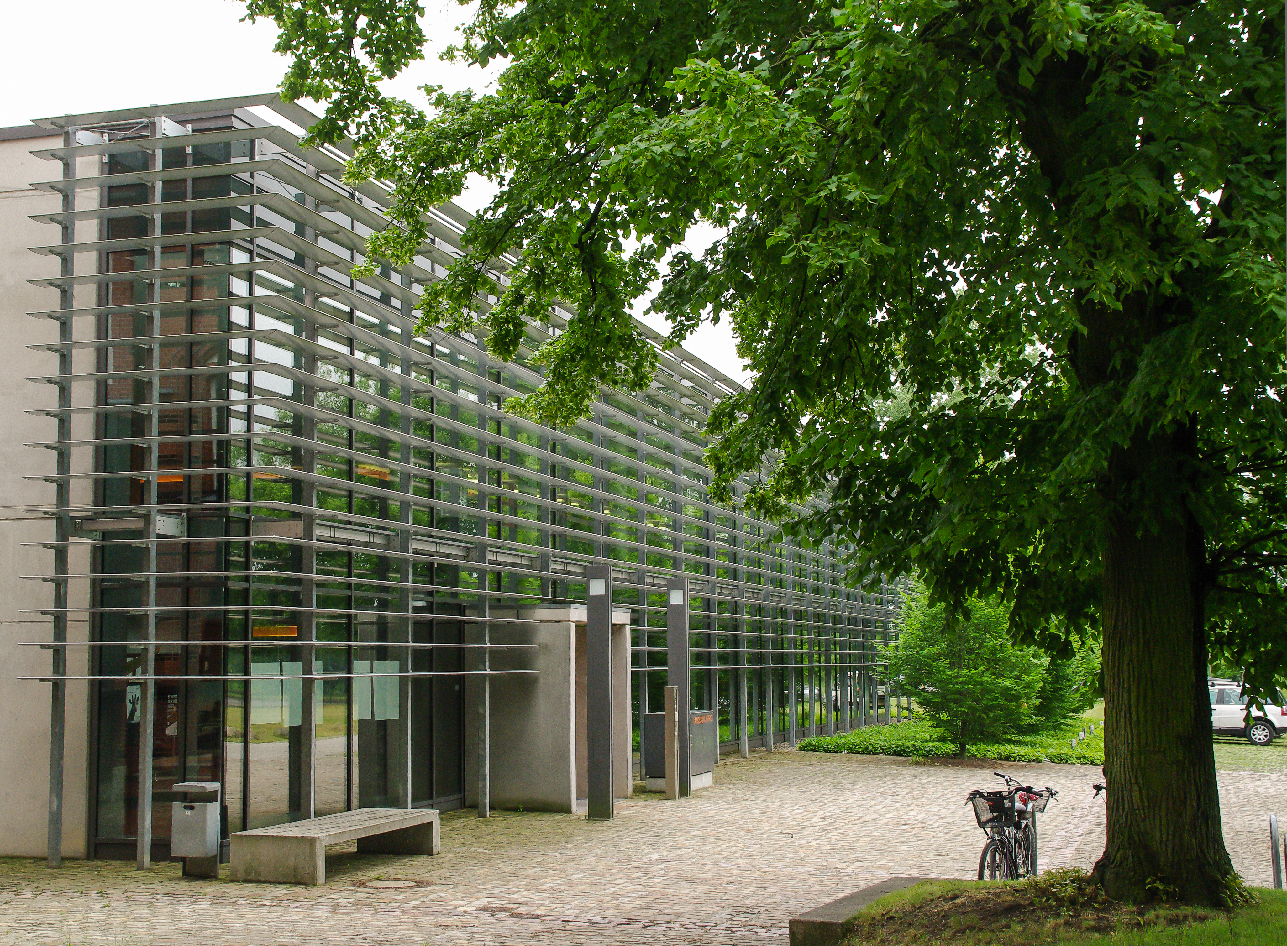 Landesbibliothek Mecklenburg-Vorpommern, Schwerin Wikipedia im Landtag – Mecklenburg-Vorpommern 19. bis 21. Juni 2013 in Schwerin Fragen zur Nachnutzung Wenn Sie Fragen zur Nachnutzung dieses Bildes haben, können Sie sich jederzeit gern an wenden Personality rights warning Although this work is freely licensed or in the public domain, the person(s) shown may have rights that legally restrict certain re-uses unless those depicted consent to such uses. In these cases, a model release or other evidence of consent could protect you from infringement claims.